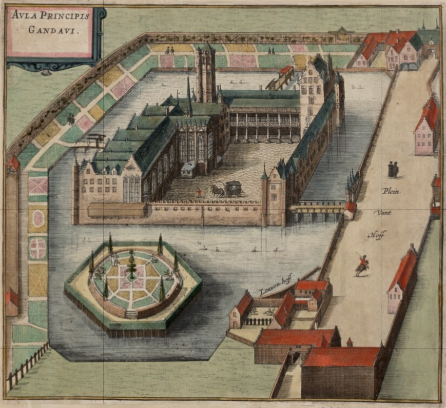 El palacio Corte de los Príncipes en Gante, lugar de nacimiento de Carlos de Habsburgo - Imagen en Flandria Illustrata (1641)